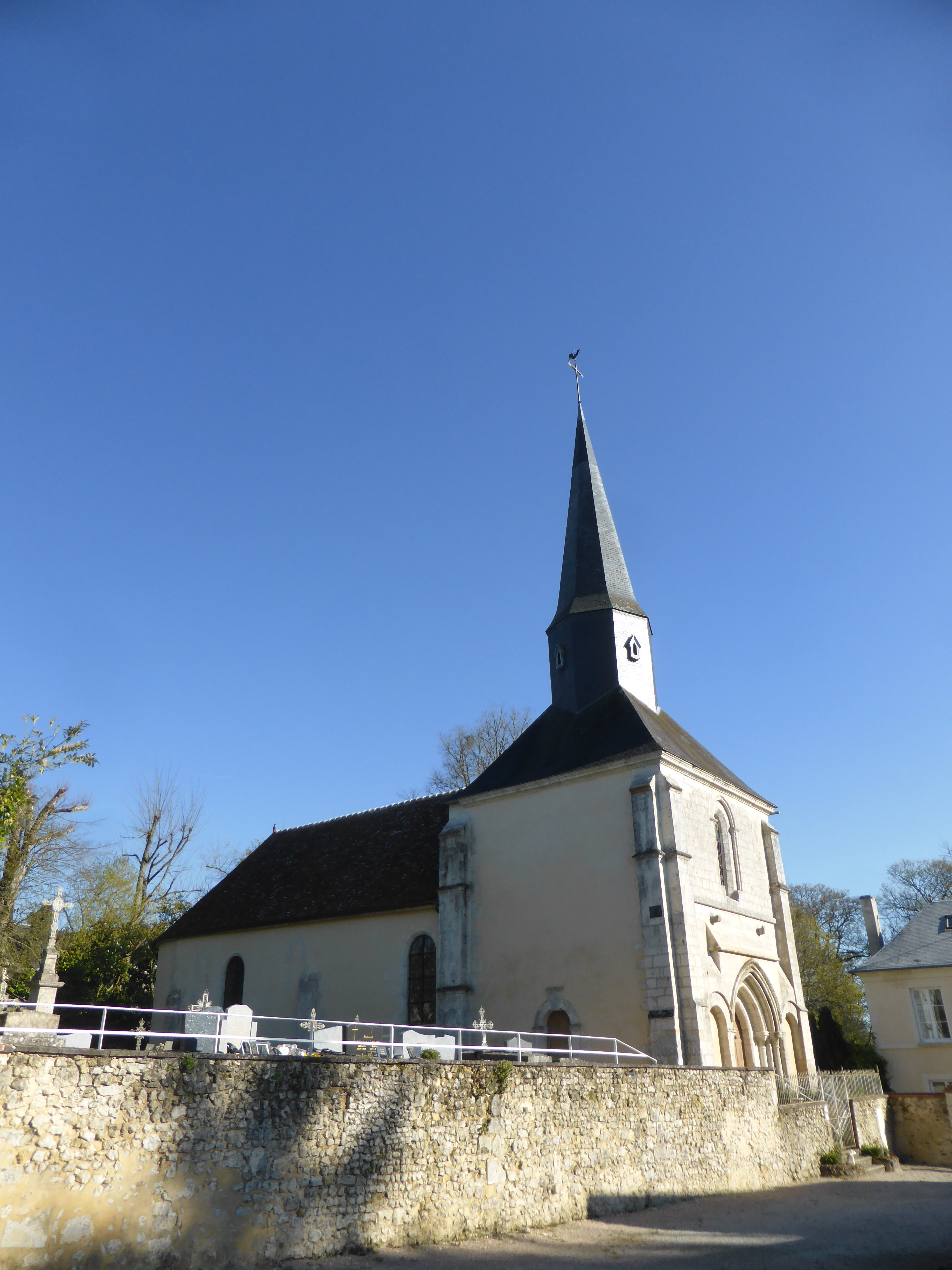 Église Saint-Martin de Corbon, dans l'Orne.